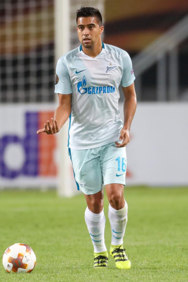 14.09.2017. Македония, Скопье, стадион «Филипп II Македонский». Лига Европы УЕФА 2017/18, 1-й тур, «Вардар» — «Зенит».